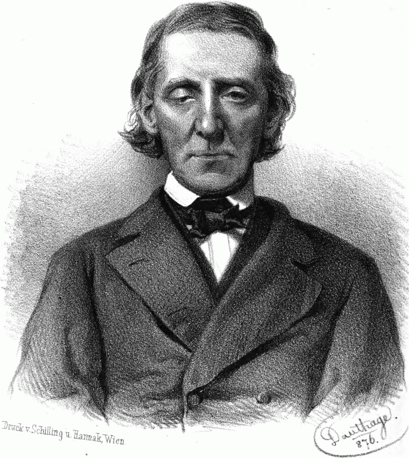 Anton Eleutherius Sauter (1800-1881), österreichischer Botaniker und Mediziner